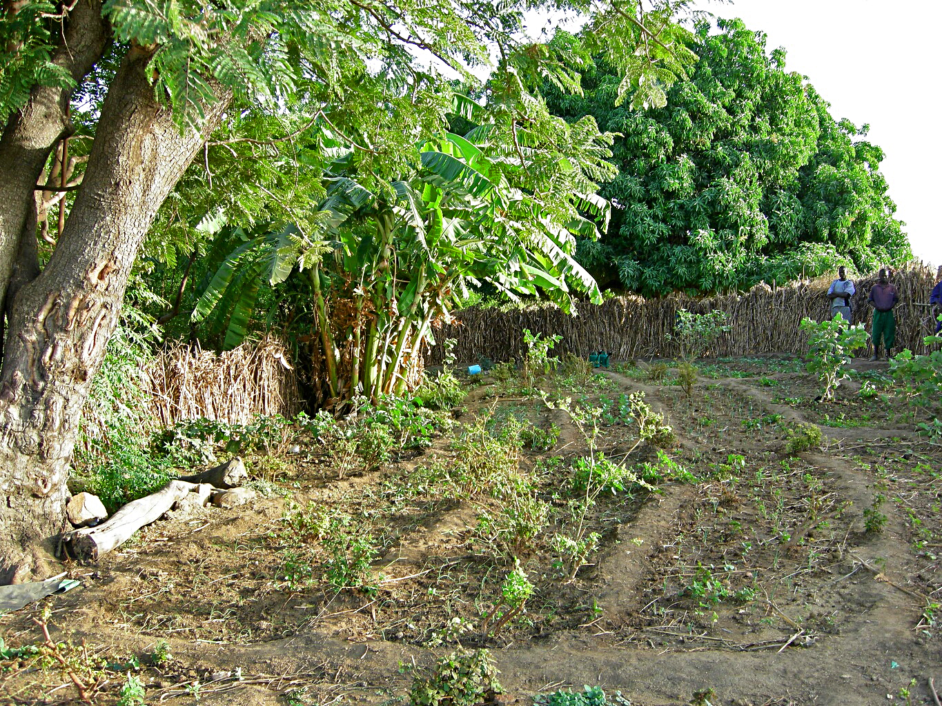 Burkina Faso: Gemüsegarten in Dourtenga